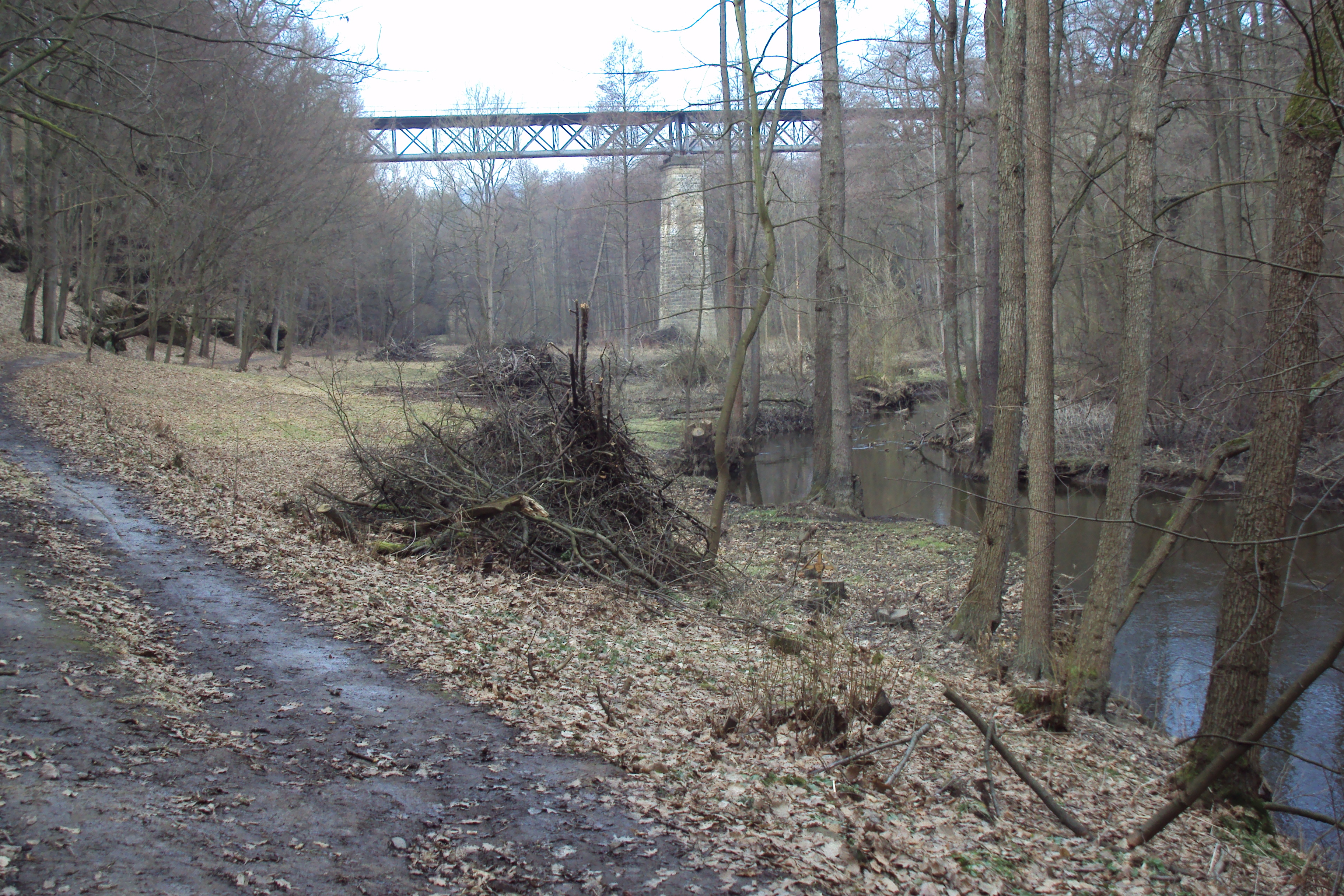 Funkční železniční most je technickou památkou, vede nad Robečským potokem a osadou Karba u Zahrádek